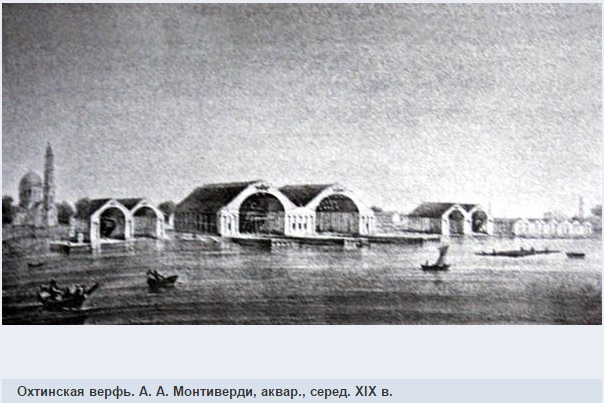 Охтенская верфь на акварели середины XIX века